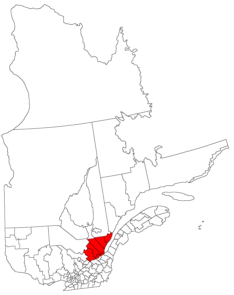 Capitale-Nationale region, Quebec